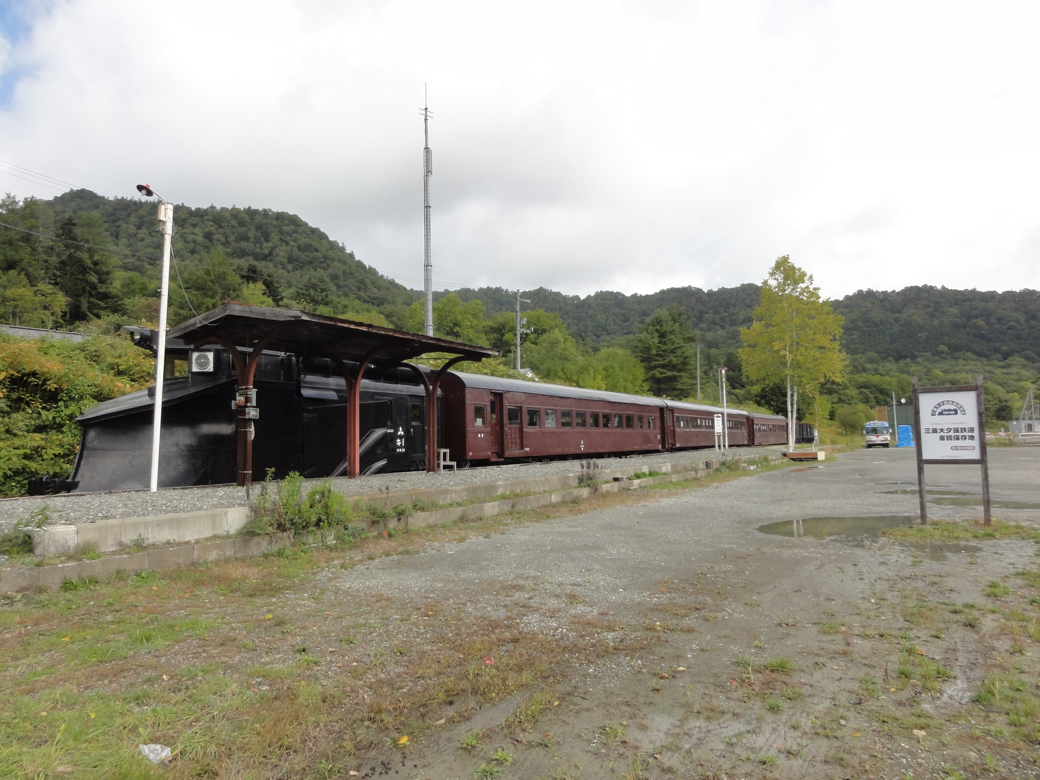 南大夕張駅跡地